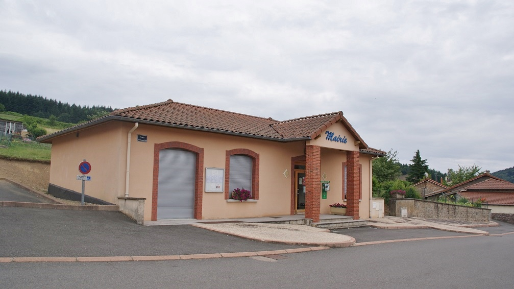 la Mairie